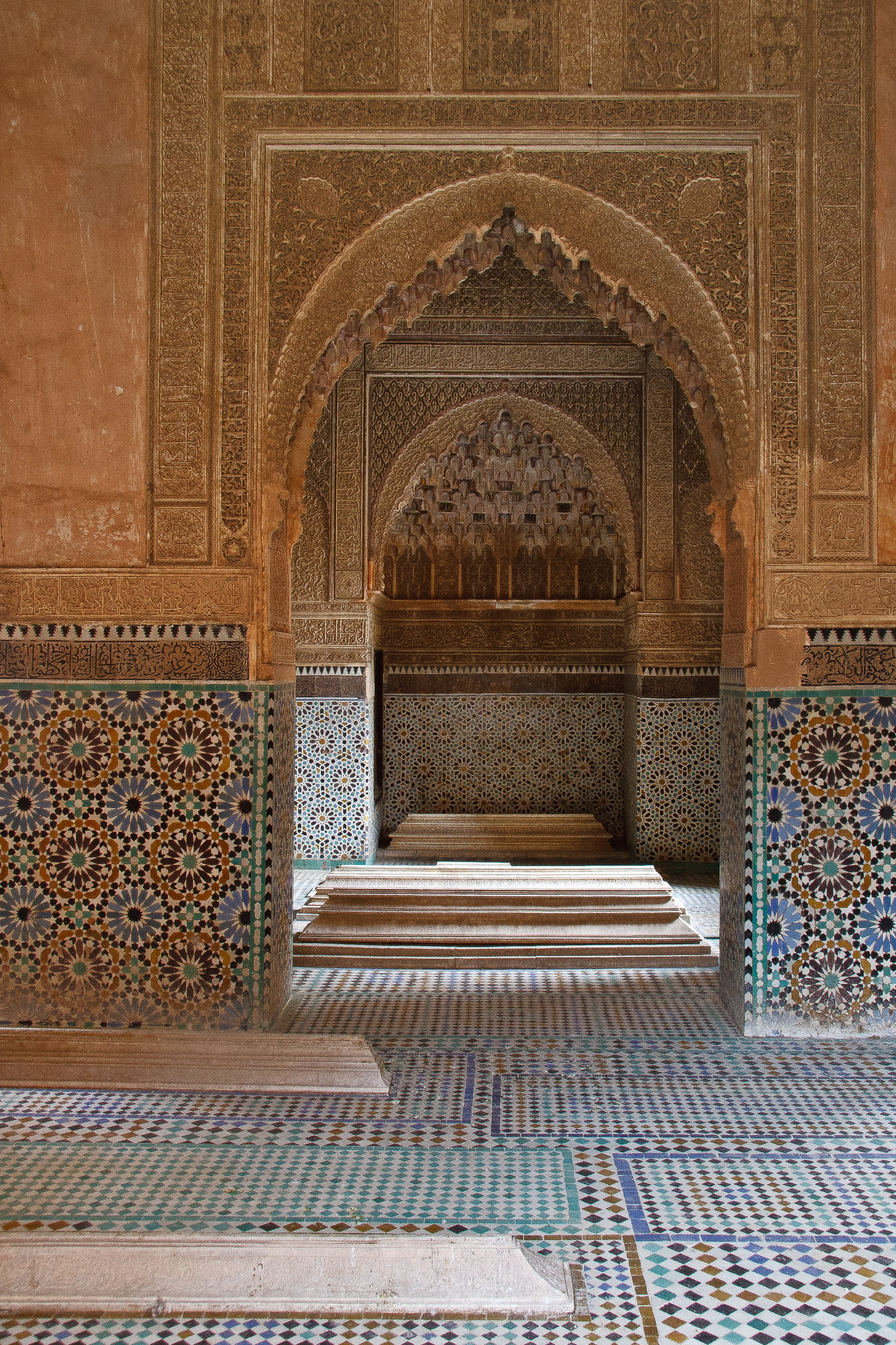 Saadian Tombs